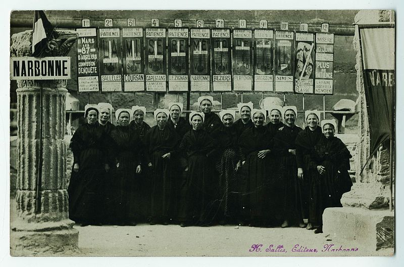 Narbonnaises devants des affiches "degrés de patience", lors des manifetations de 1907